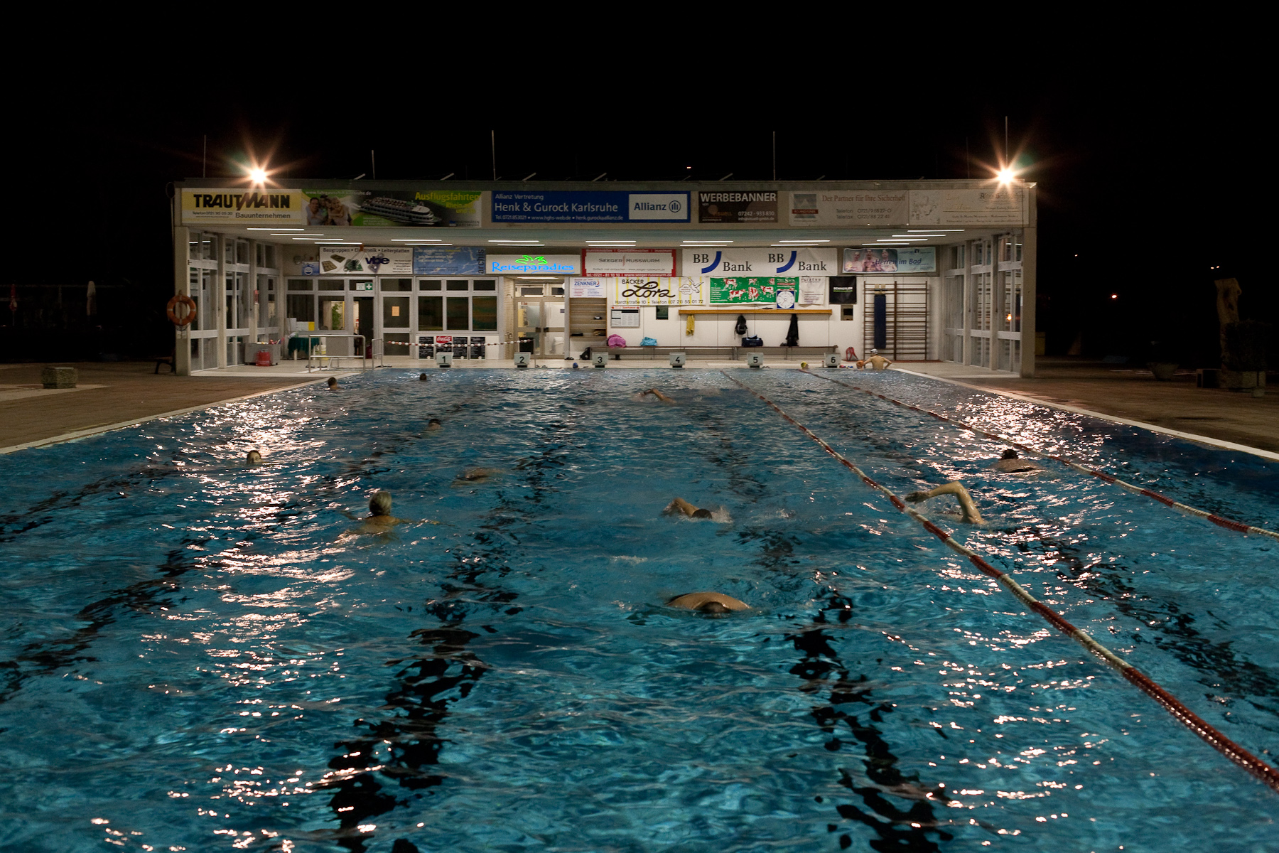 Sonnenbad Karlsruhe bei Nacht(Originalbeschreibung: »Das Schwimmerbecken des Sonnenbades in Karlsruhe – hier ohne Sonne... (am Abend)«)